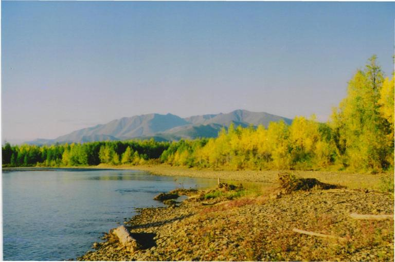 Река Сеймчан и отроги Полярного хребта